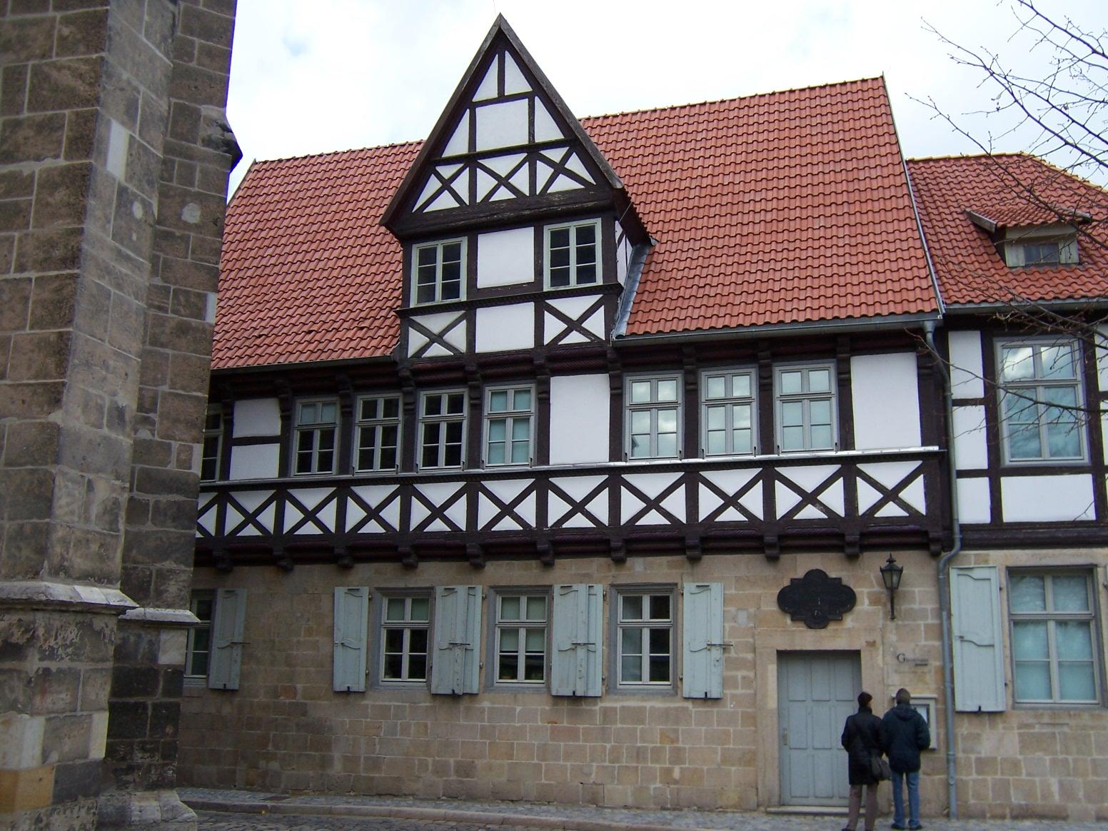 Haus des Dichters Johann Wilhelm Ludwig Gleim in Halberstadt, Sachsen-Anhalt / House of the poet Johann Wilhelm Ludwig Gleim in Halberstadt, Saxony-Anhalt (Germany) eigene Aufnahme vom 14. April 2006 / own work, photo taken on 14 April 2006